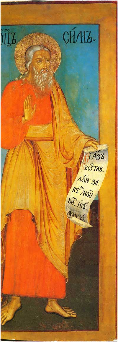 Праотец Сим. Иконостас из церкви села Селезениха Тверской губернии. Праотеческий чин. Конец XVIII в. Дерево, темпера. Государственный научно-исследовательский институт реставрации, Москва, Россия.